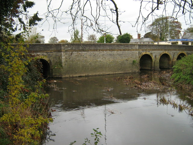 Ilchester Bridge